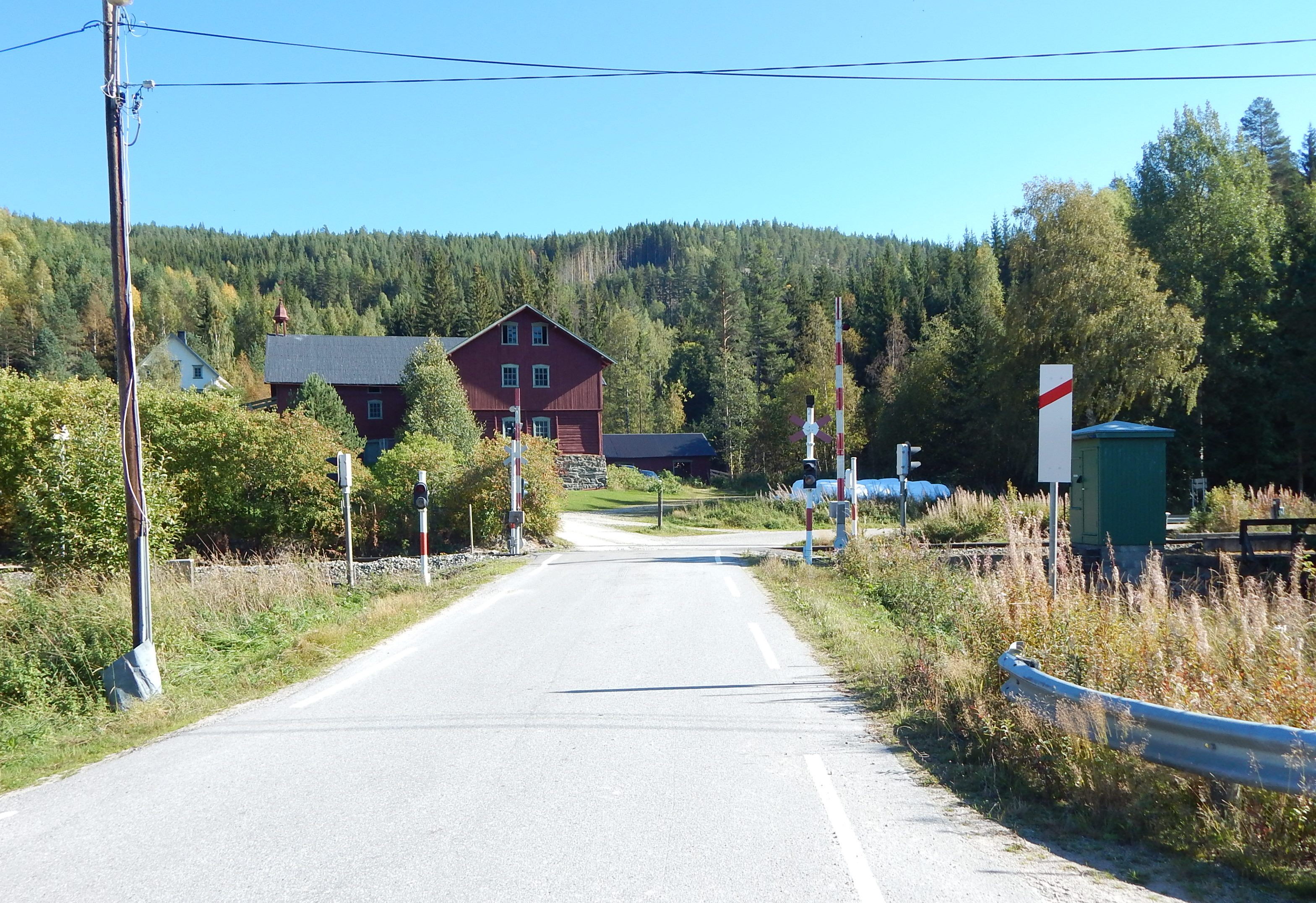 Fylkesvei 606 mot planovergang ved Stai